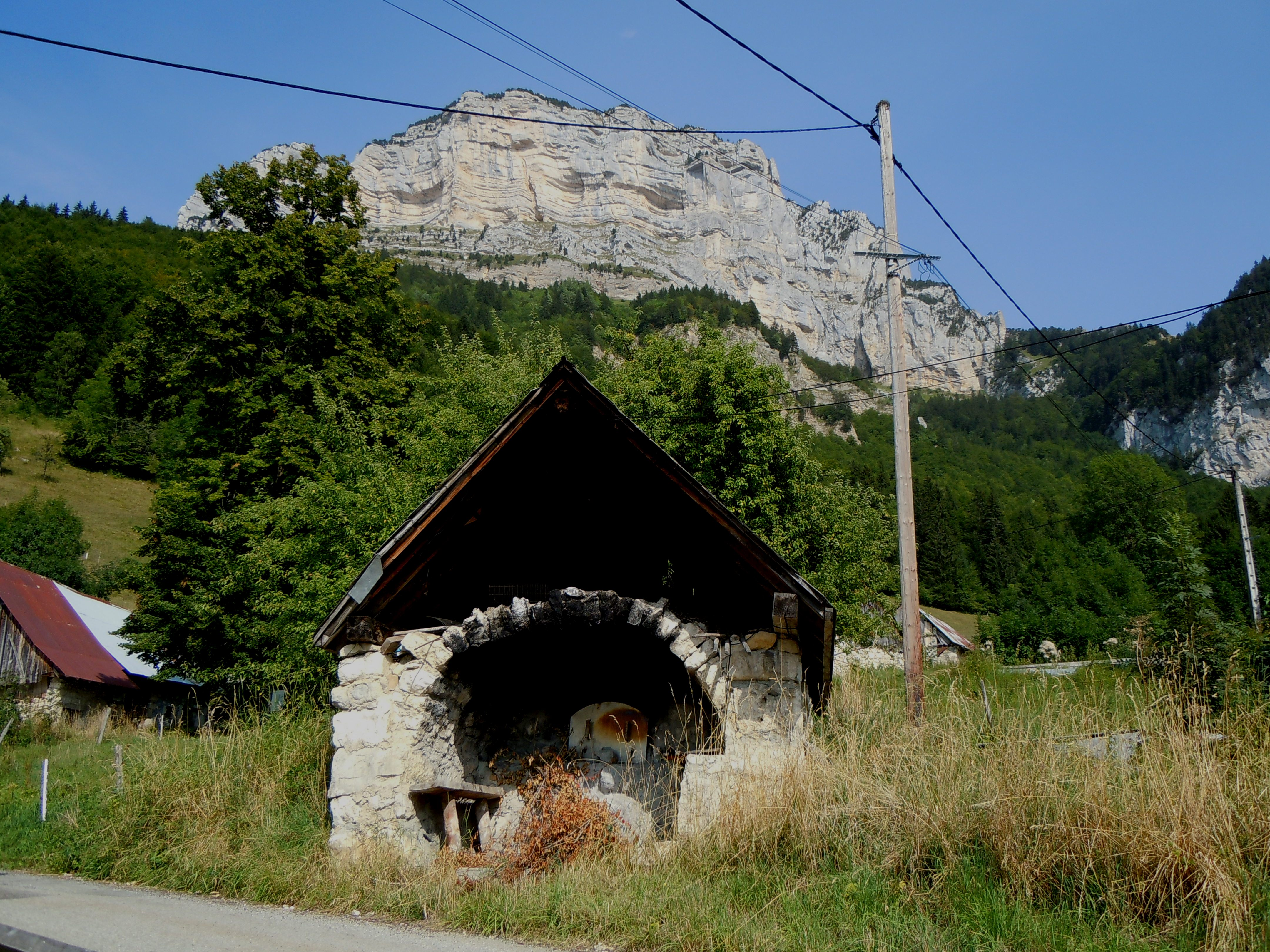 Four à Pain de La Plagne - Entremont le Vieux, au pied du Col de l'Alpette et du Granier - Savoie - France